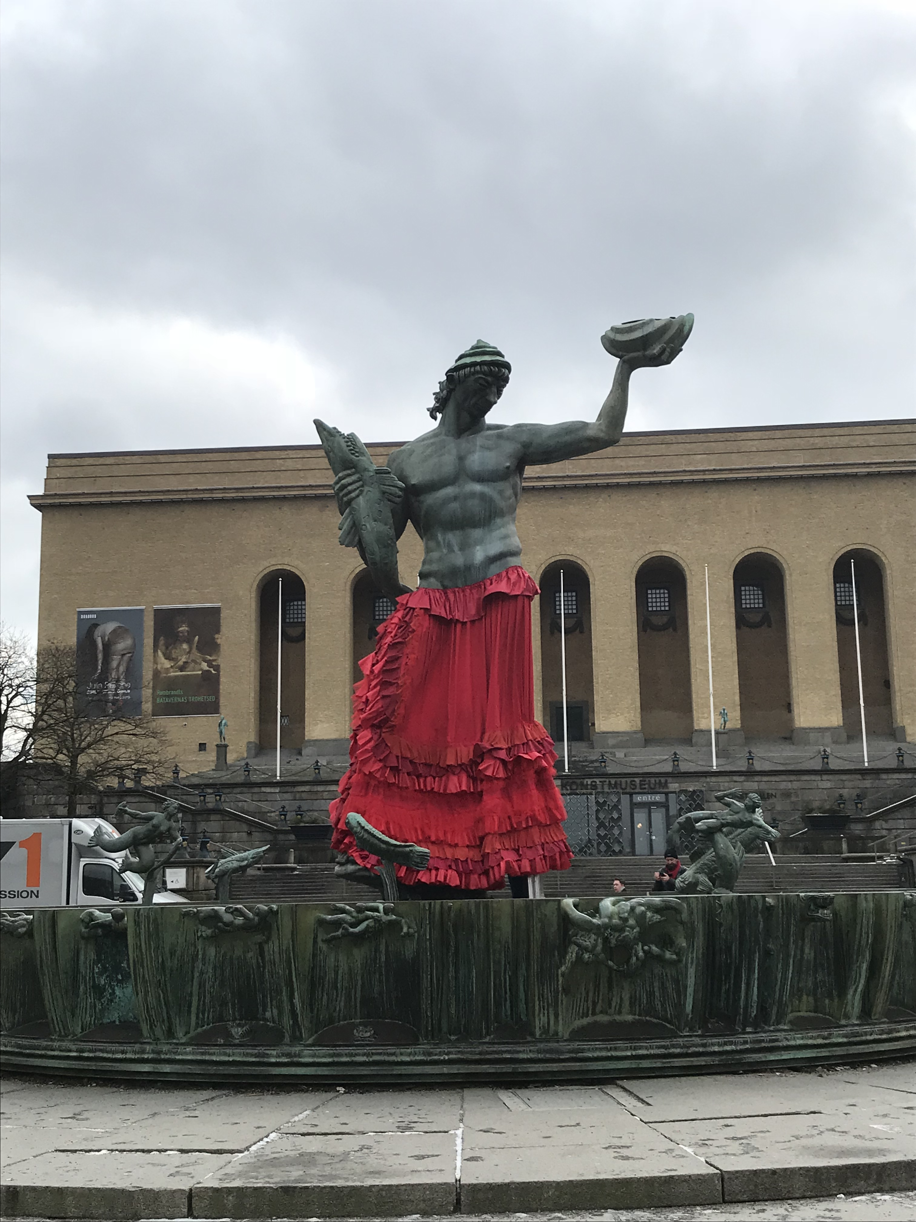 Poseidon på Götaplatsen iförd röd flamencokjol..